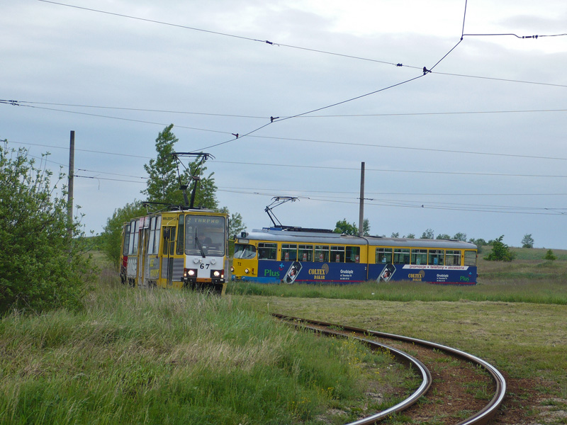 Grudziądz, pętla Tramwajowa na osiedlu Rządz, wybudowana w 1996 r. Tramwaj Konstal 805Nb z 1993 roku, za nim prawdopodobnie Duewag GT6 z lat 60.